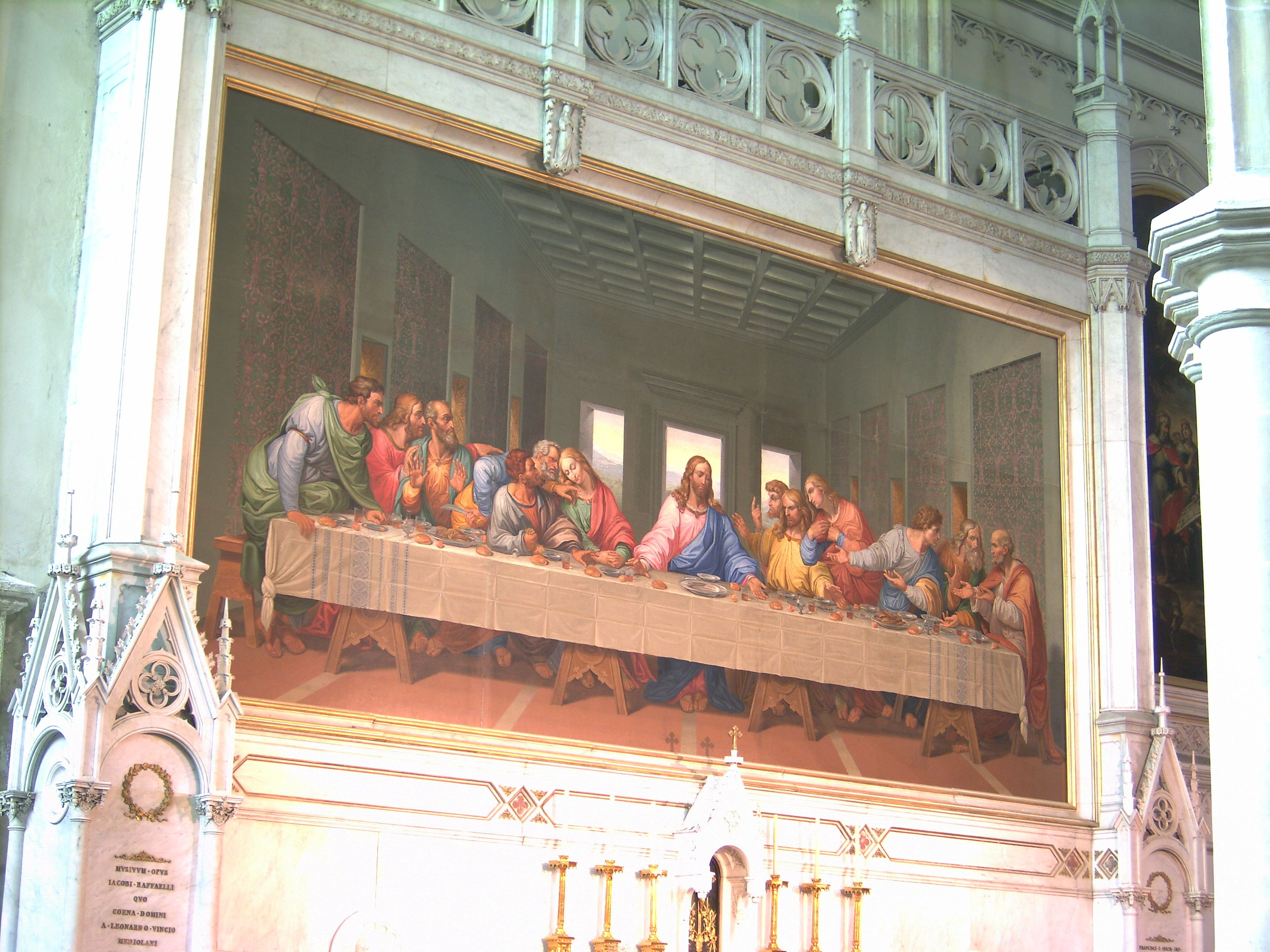 Die Mosaikkopie des Letzten Abendmahls in der Minoritenkirche (Wien)